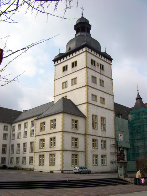 Paderborn: Gymnasium Theodorianum Sonstiges: Dies ist der Hauptturm, restliche Gebäude zur Zeit eingerüstet